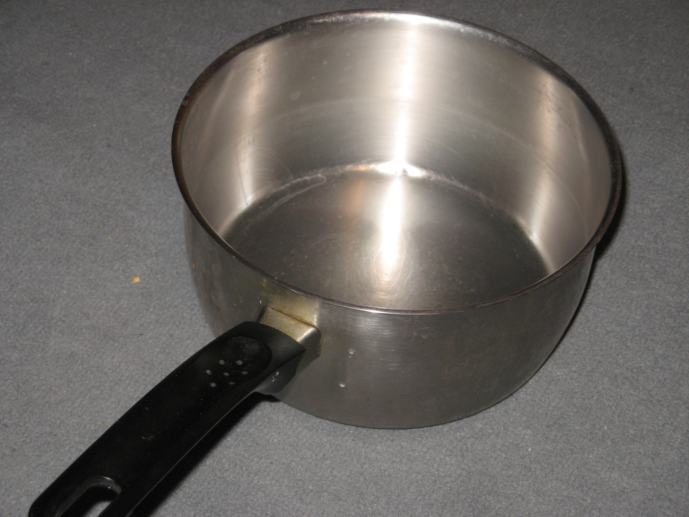 Une casserole